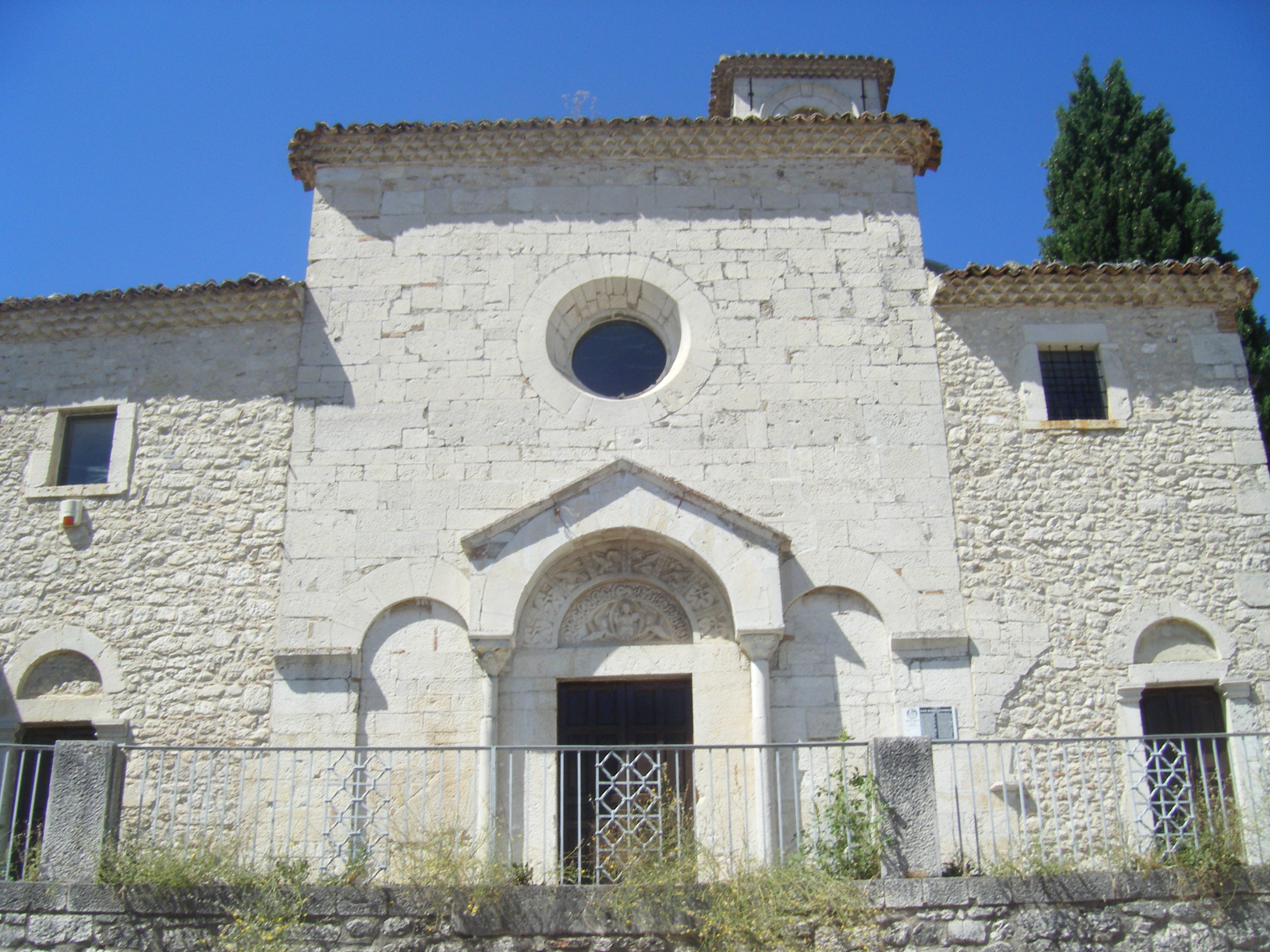 Facciata della Chiesa di San Bartolomeo a Campobasso, Italia